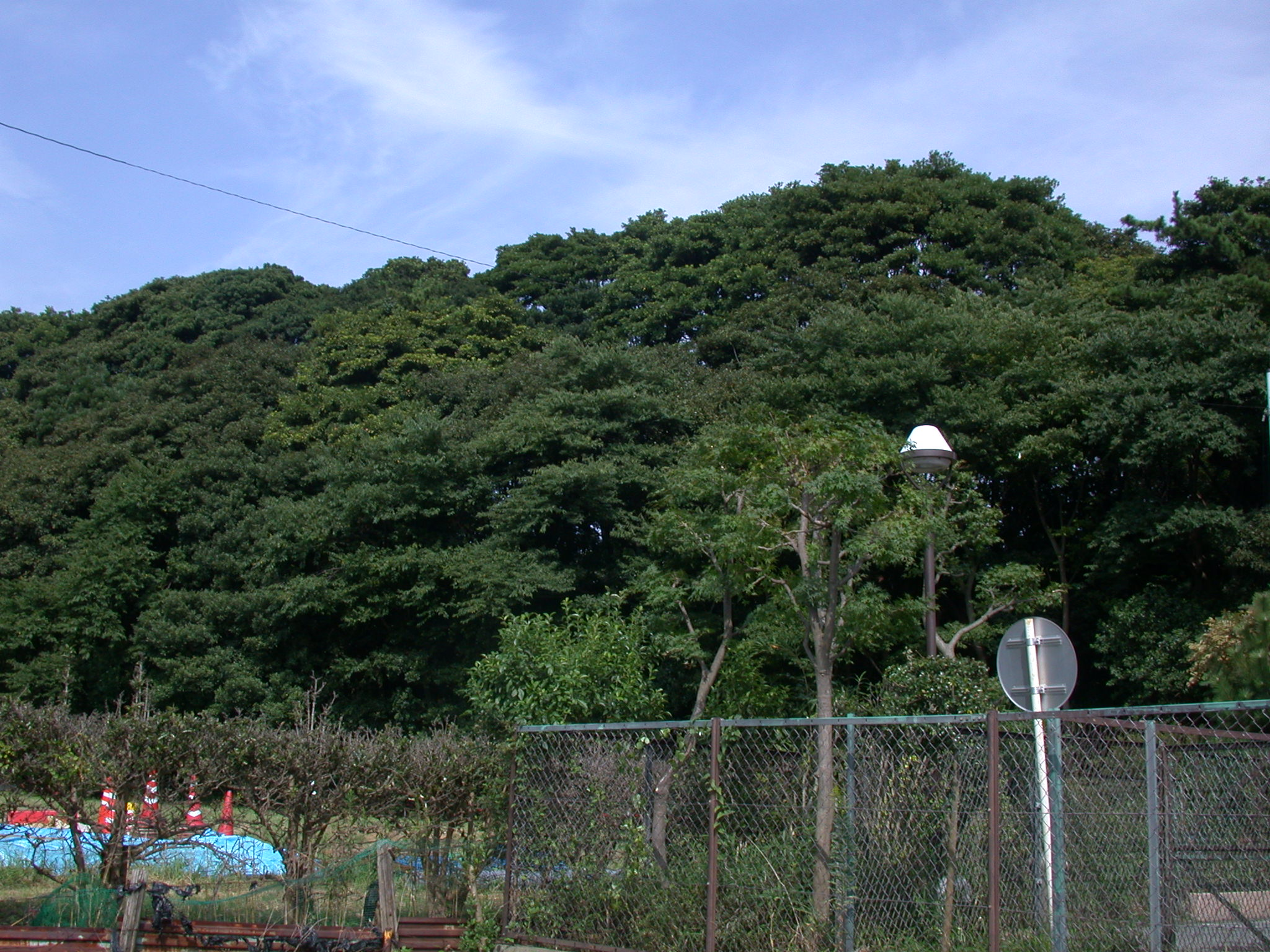 Saginuma Castle